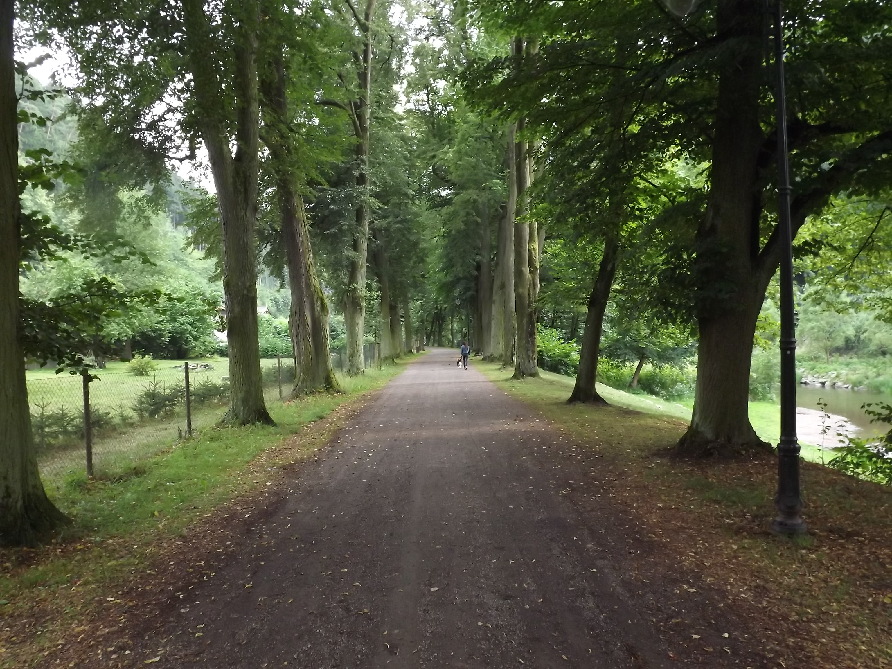 POtštejn